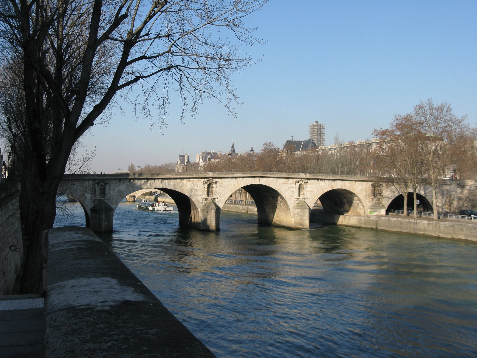 Мост через Сену до острова Сен-Луи